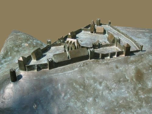 Bronzemodell der Burg Stromberg